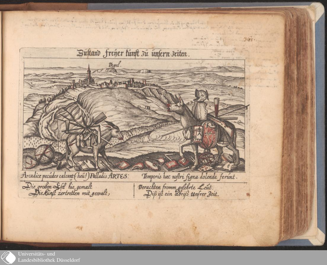 Vegel. Zustand freyer künst zu unsern zeiten, erschienen in: Thesaurus philo-politicus, h. e. emblemata s. moralia politica ... : accessit civitatum et urbium vera delineatio / Daniel Meisner (1624). Jg. Folge 1 Buch 5-8